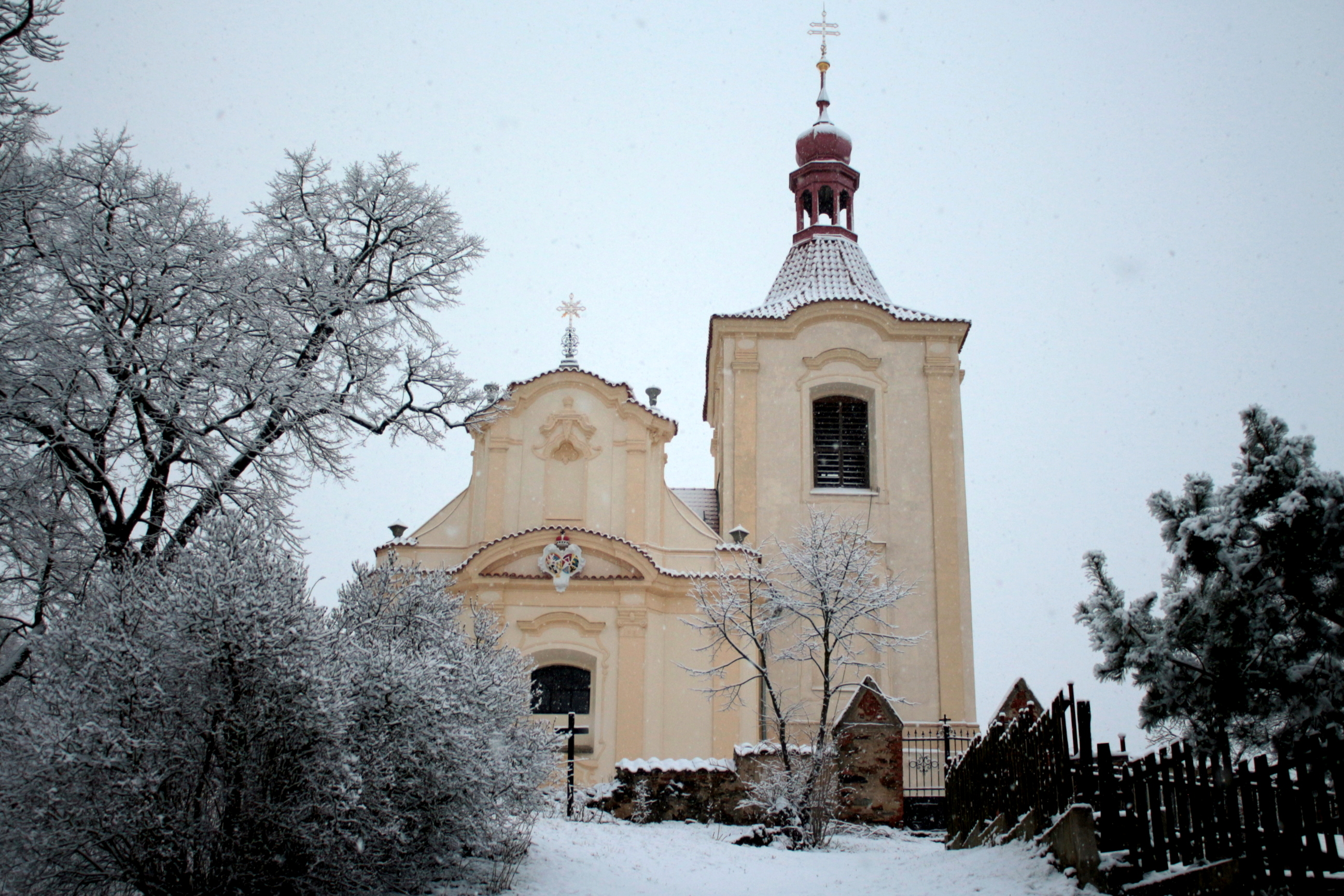 Sluštice